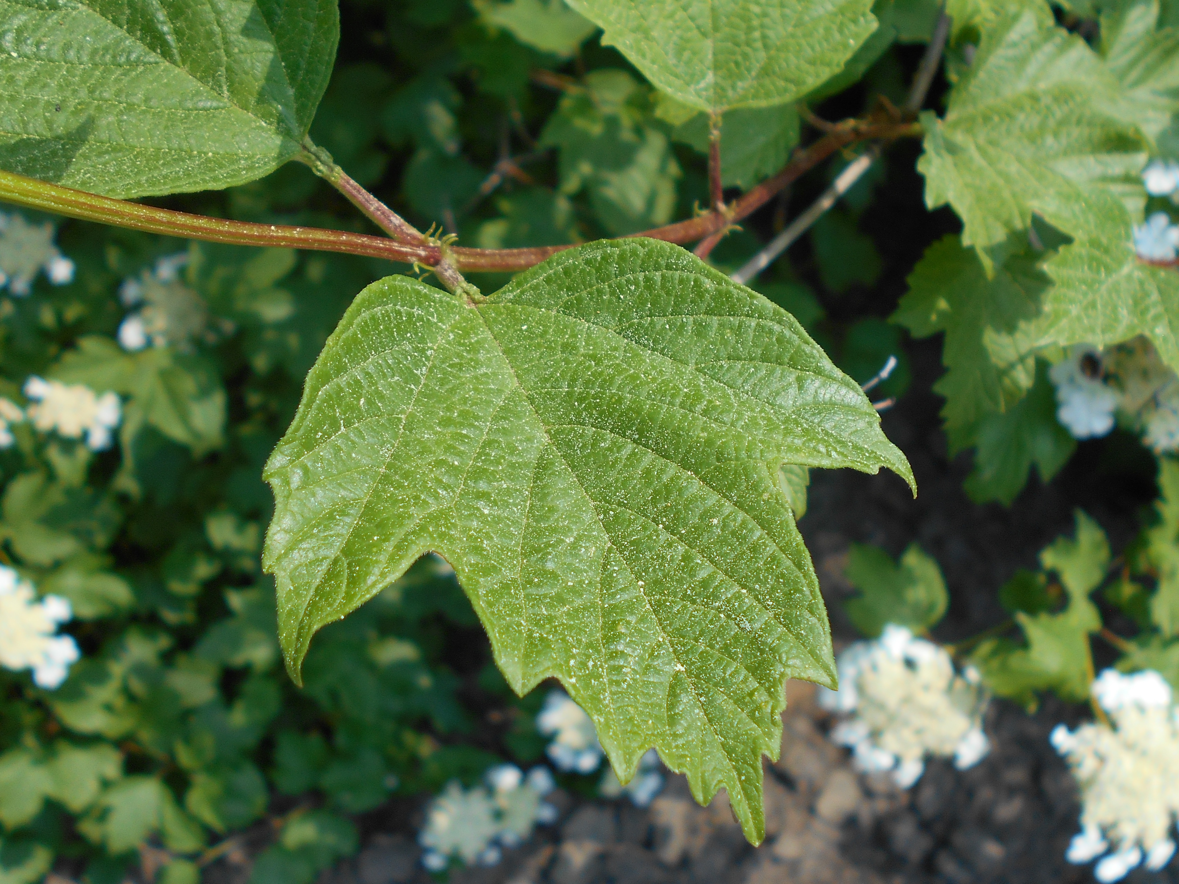 Viburnum opulus var. americanum, Botanischer Garten Berlin.